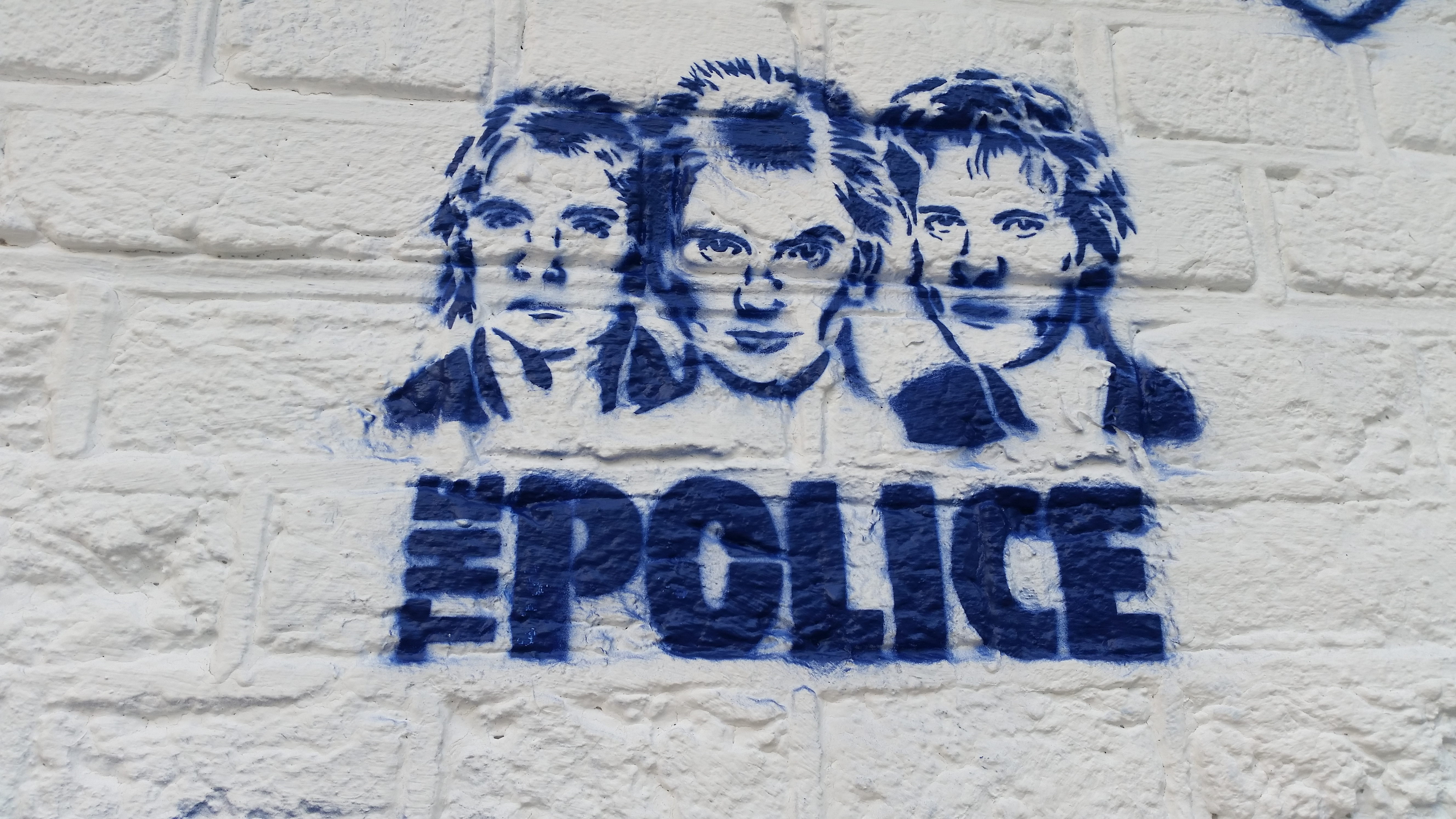 Hemonystraat 4, Amsterdam, Portret van The Police door Hugo Kaagman